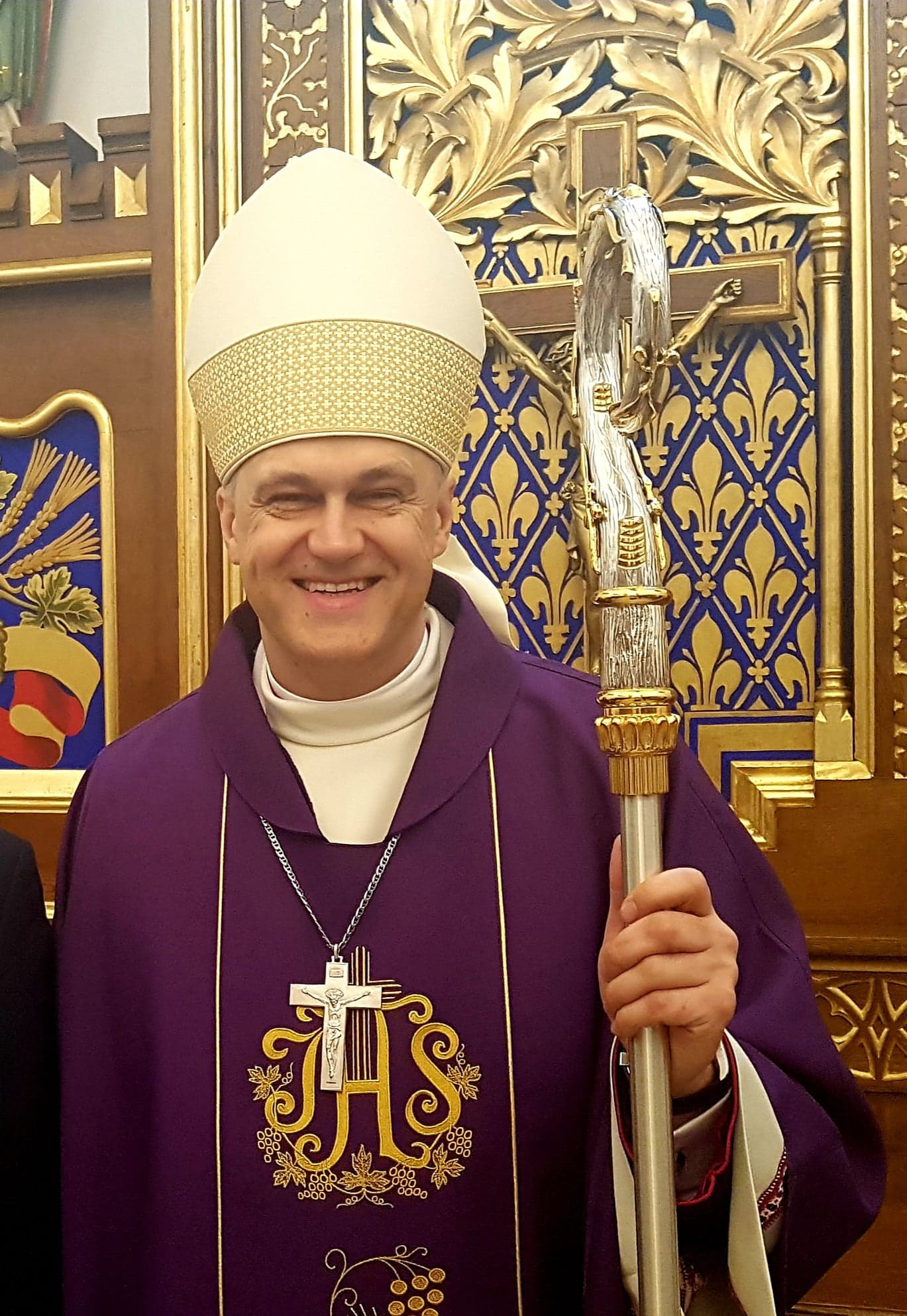 Biskup Wojciech Skibicki, dzień po sakrze